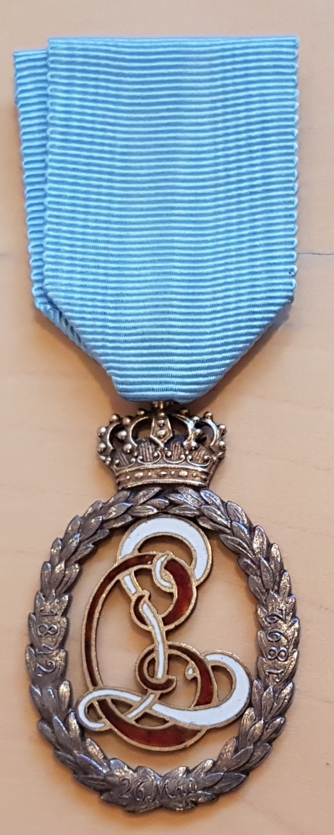 Erindringstegnet i anledning af Kong Christian IX og Dronning Louises Guldbryllup sølv i lodret bånd